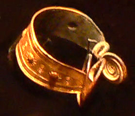 Fibel aus dem Goldhort von Gessel, präsentiert bei Pressekonferenz, Goldhort von Gessel, fotografiert im Niedersächsischen Landesamt für Denkmalpflege